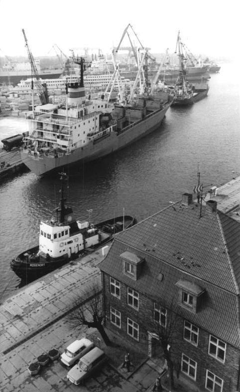 Wismar, Hafen, "Baumhaus" ADN-ZB Sindermann 17.4.86 Bez. Rostock: Städteporträt Wismar- Der alte Hafen Wismars mit dem Baumhaus, wo früher ein "Baum" aus Langholz die Hafeneinfahrt zur Nachtzeit oder bei drohender Gefahr sperrte, ist noch immer ein wichtiger Umschlagplatz von Holz und Ausrüstungsplatz der Mathias-Thesen-Werft.